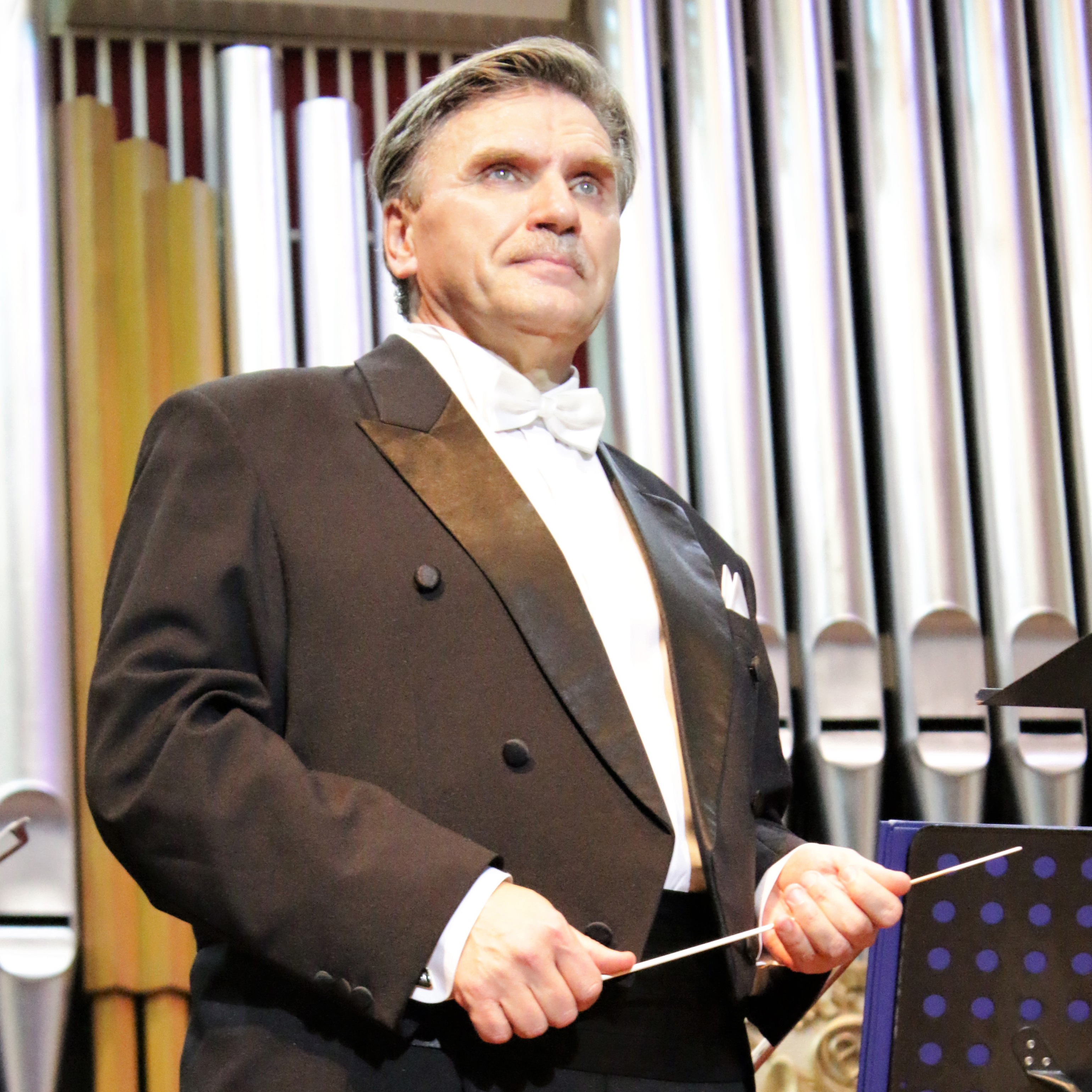 Roman Moiseyev